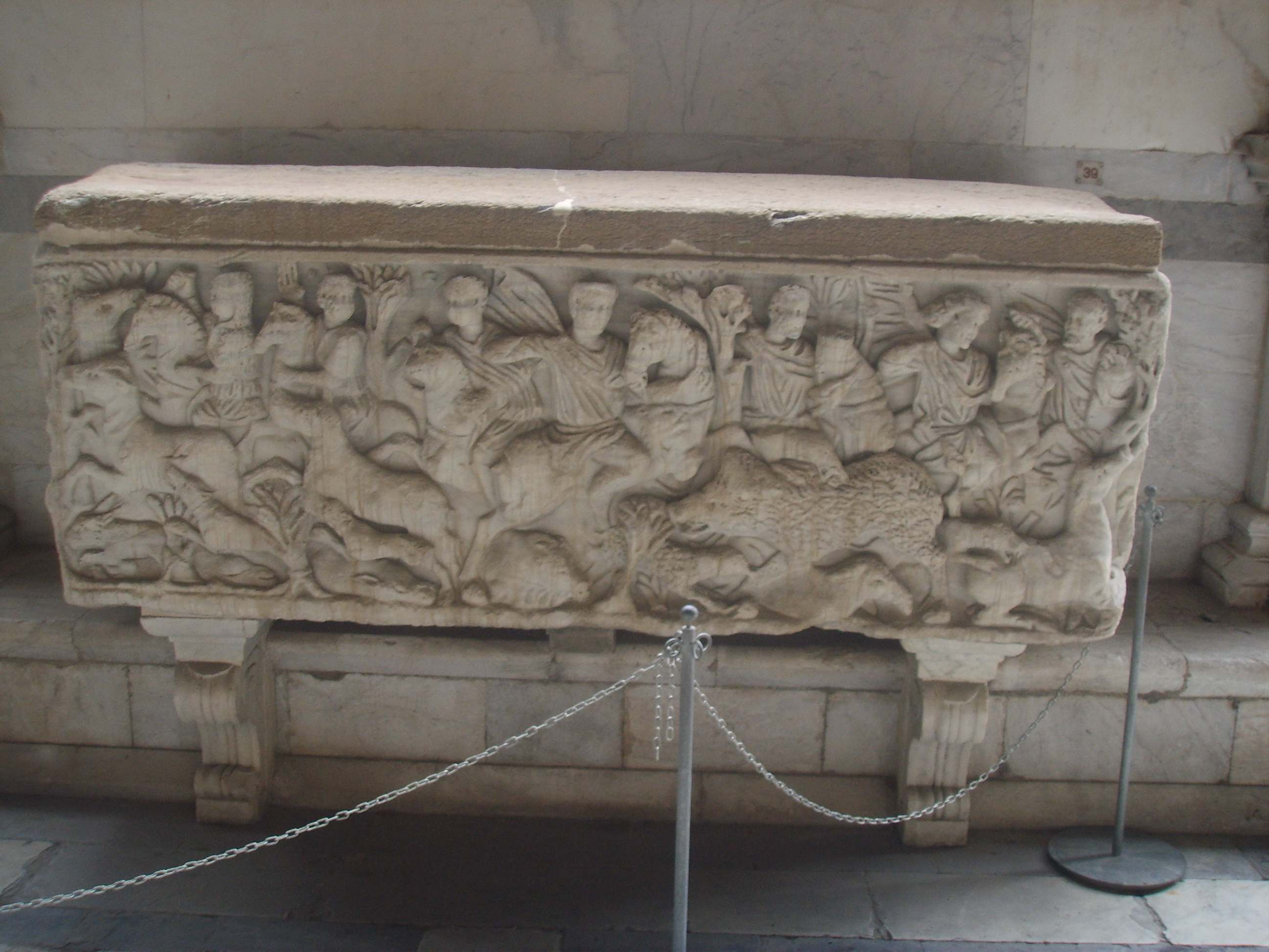 Camposanto Monumentale (monumental graveyard) Roman age sarcophagus. In Pisa, Italy.